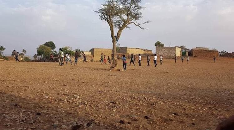 Adi Bakel Bewohner